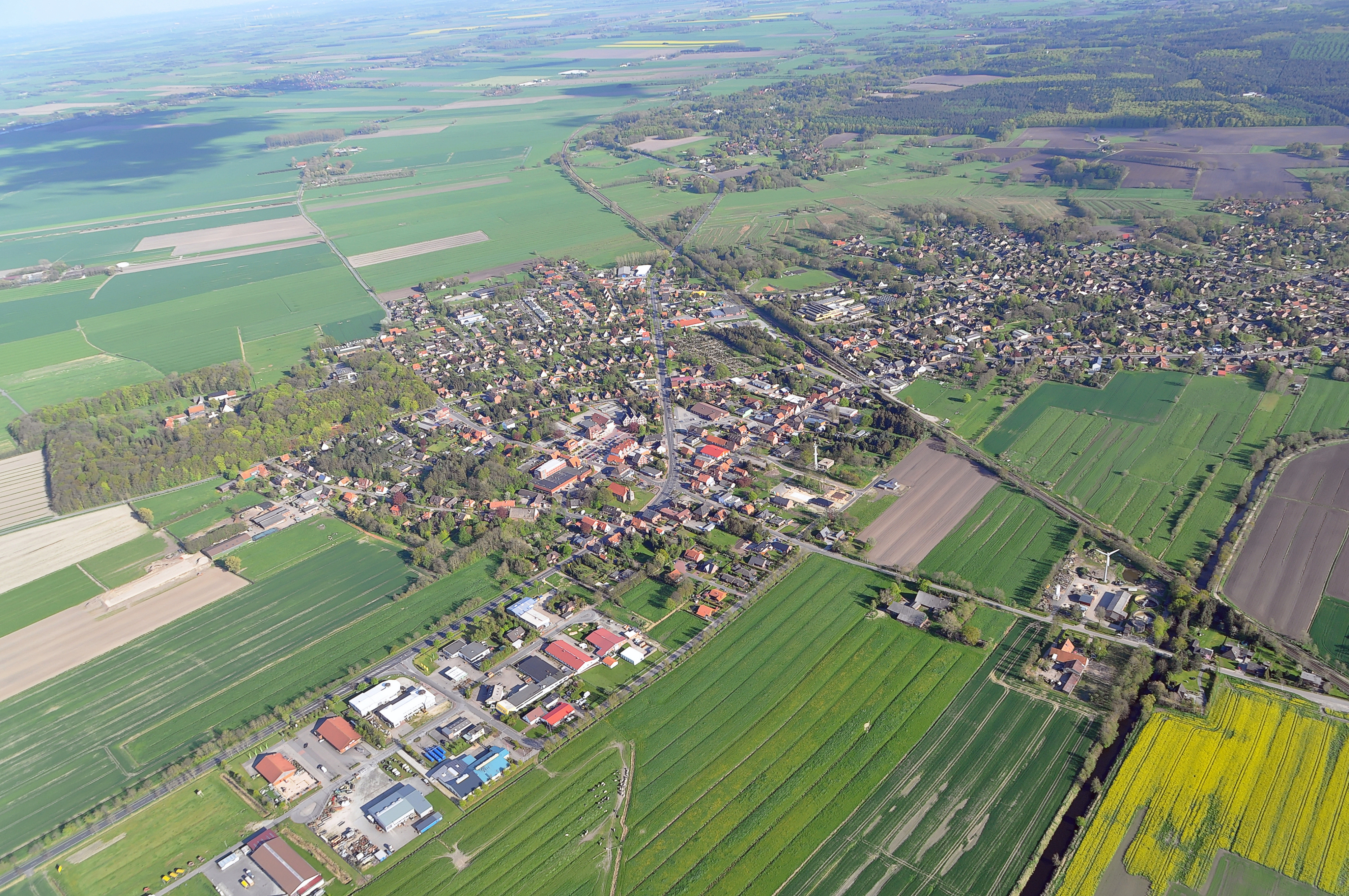 Luftbilder von der Nordseeküste 2012-05